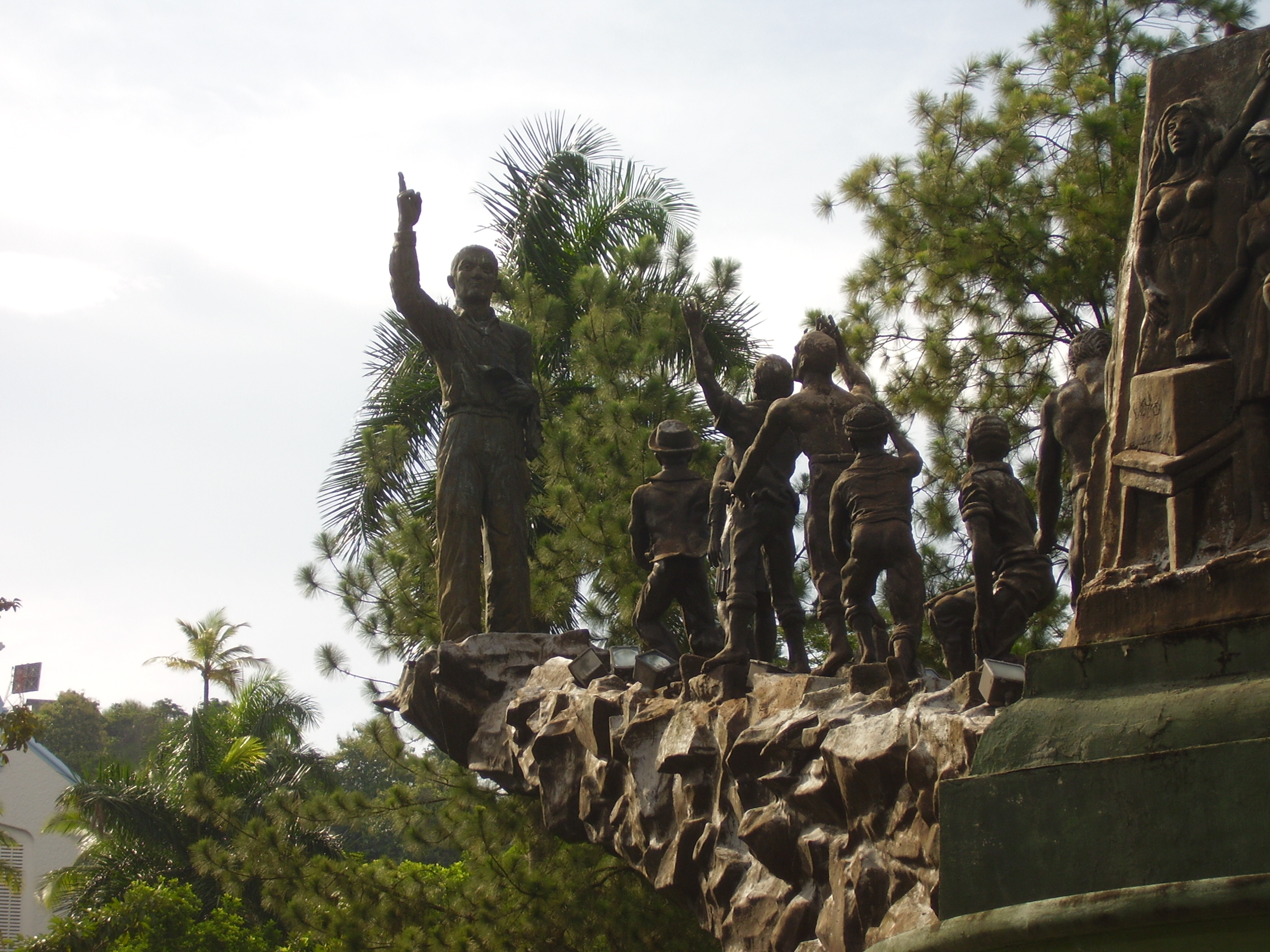 Monumento a Arnulfo Arias Madrid, Presidente No.18 de Panamá